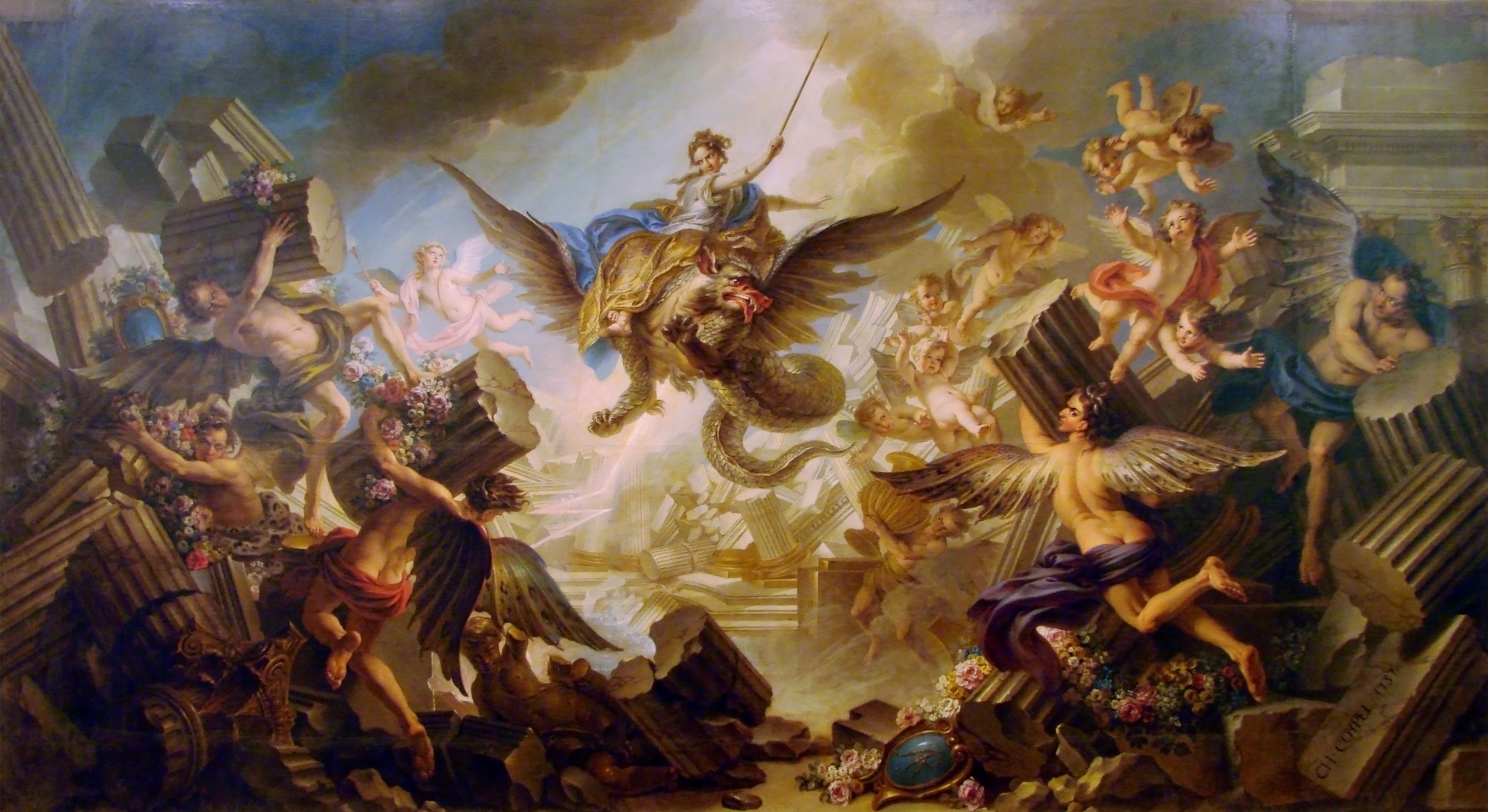 Carton de tapisserie pour la tenture des "Fragments d'opéras", commandé par la Manufacture des Gobelins en 1733, et inspiré par l'Armide de Quinault et Lully.